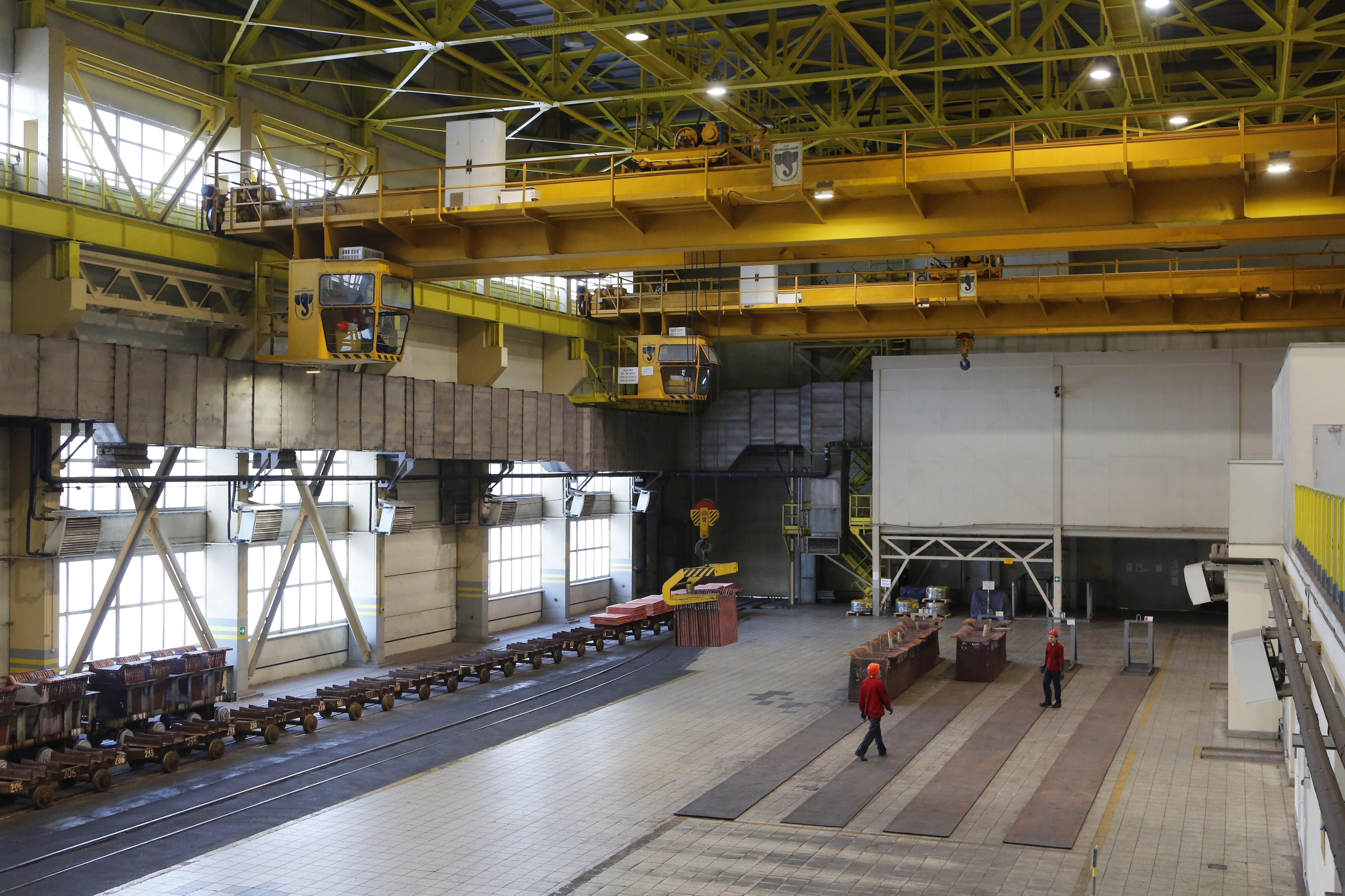 Вики-экспедиция "Медная столица России", день первый. Ангар сырья и готовой продукции цеха электролиза меди.